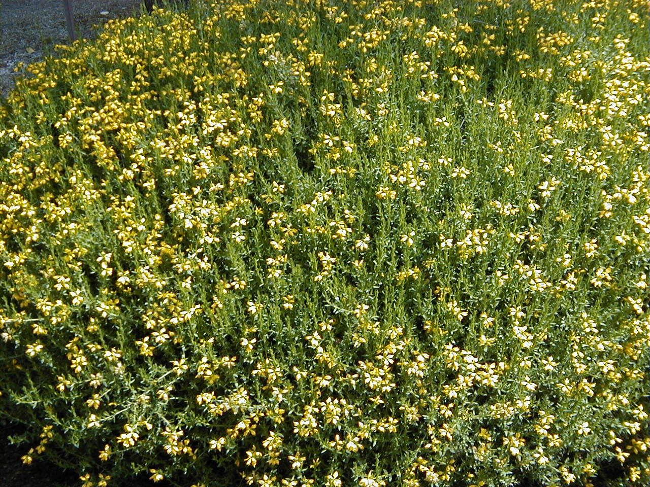 Genista hispanica. Real Jardín Botánico, Madrid